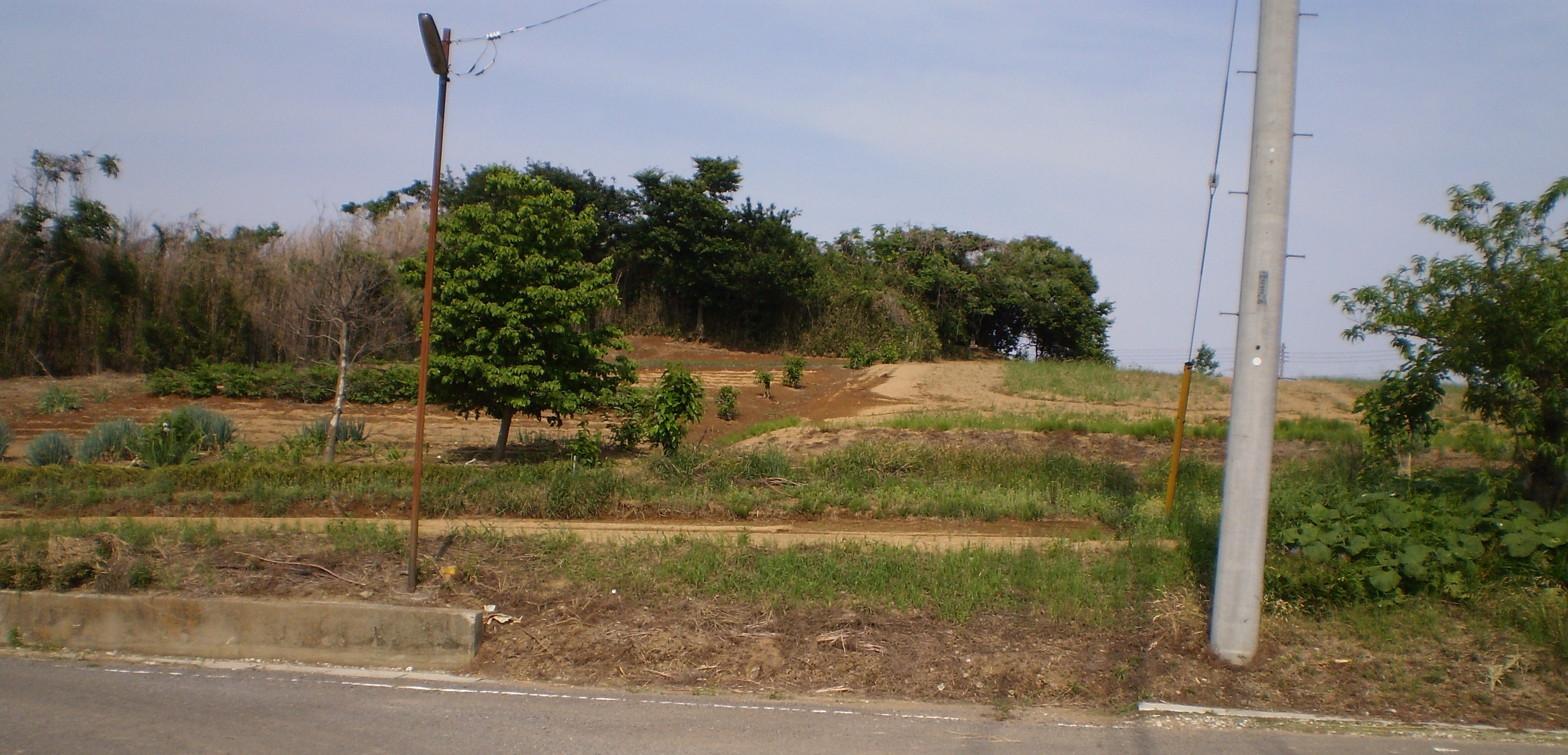 Sagiyama Kofun tumulus